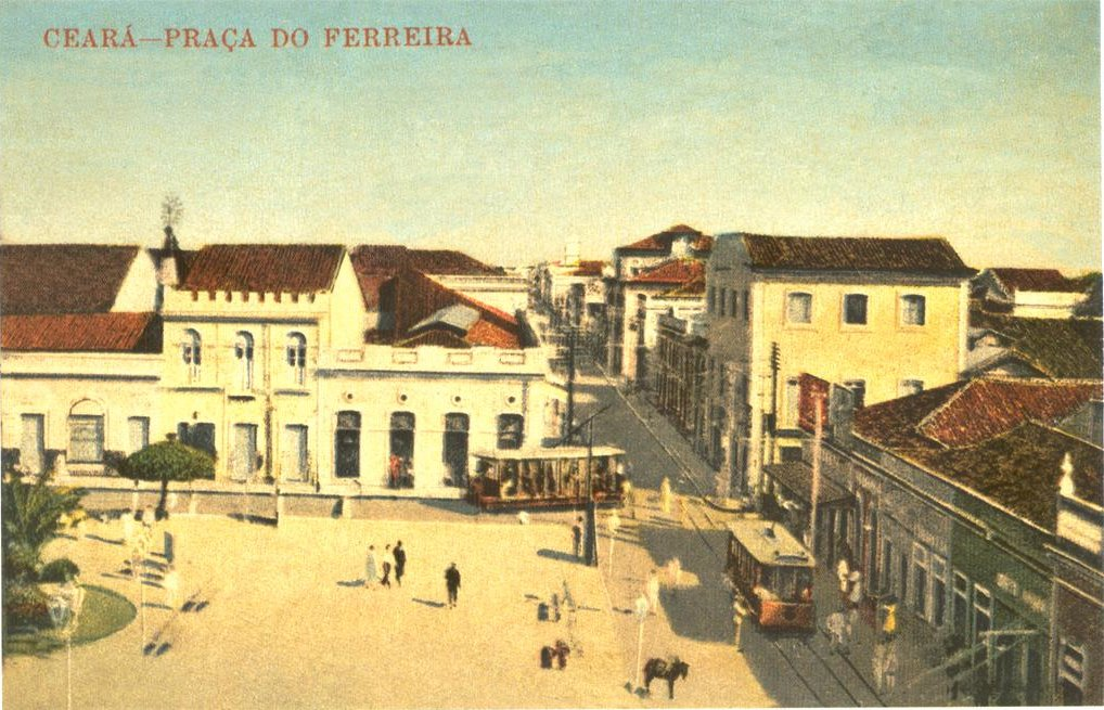 Vista da Praça do Ferreira no cruzamento da Major Facundo com Guilherme Rocha